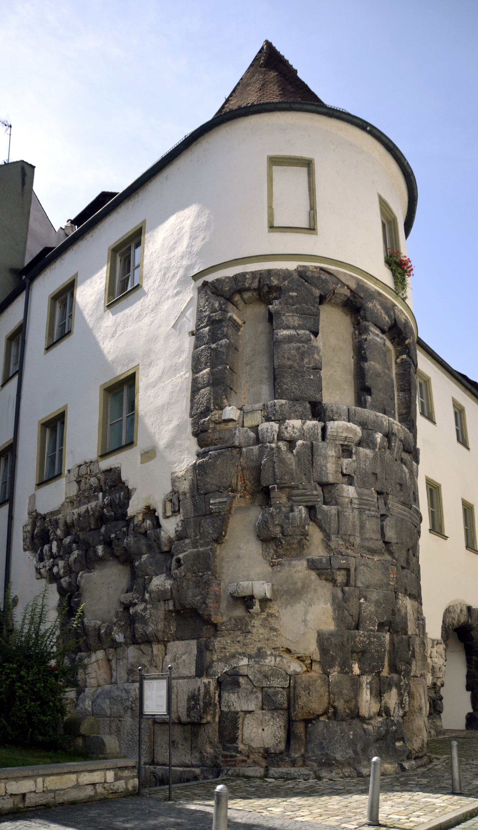 Castra Regina, Porta Praetoria in Regensburg.